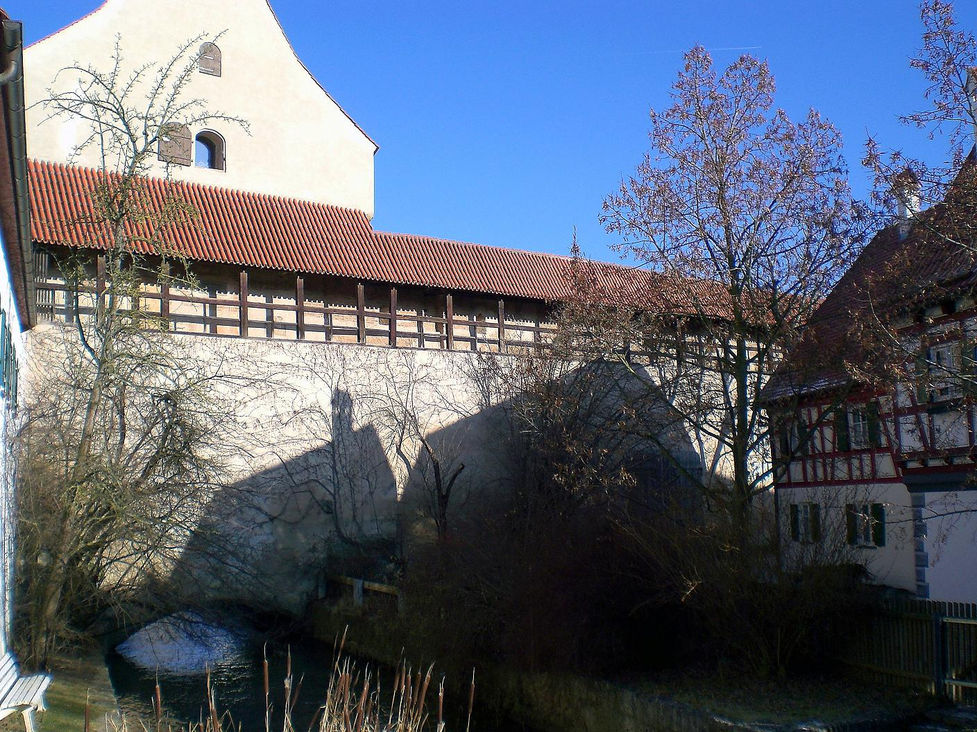 Eger river Nördlingen Germany